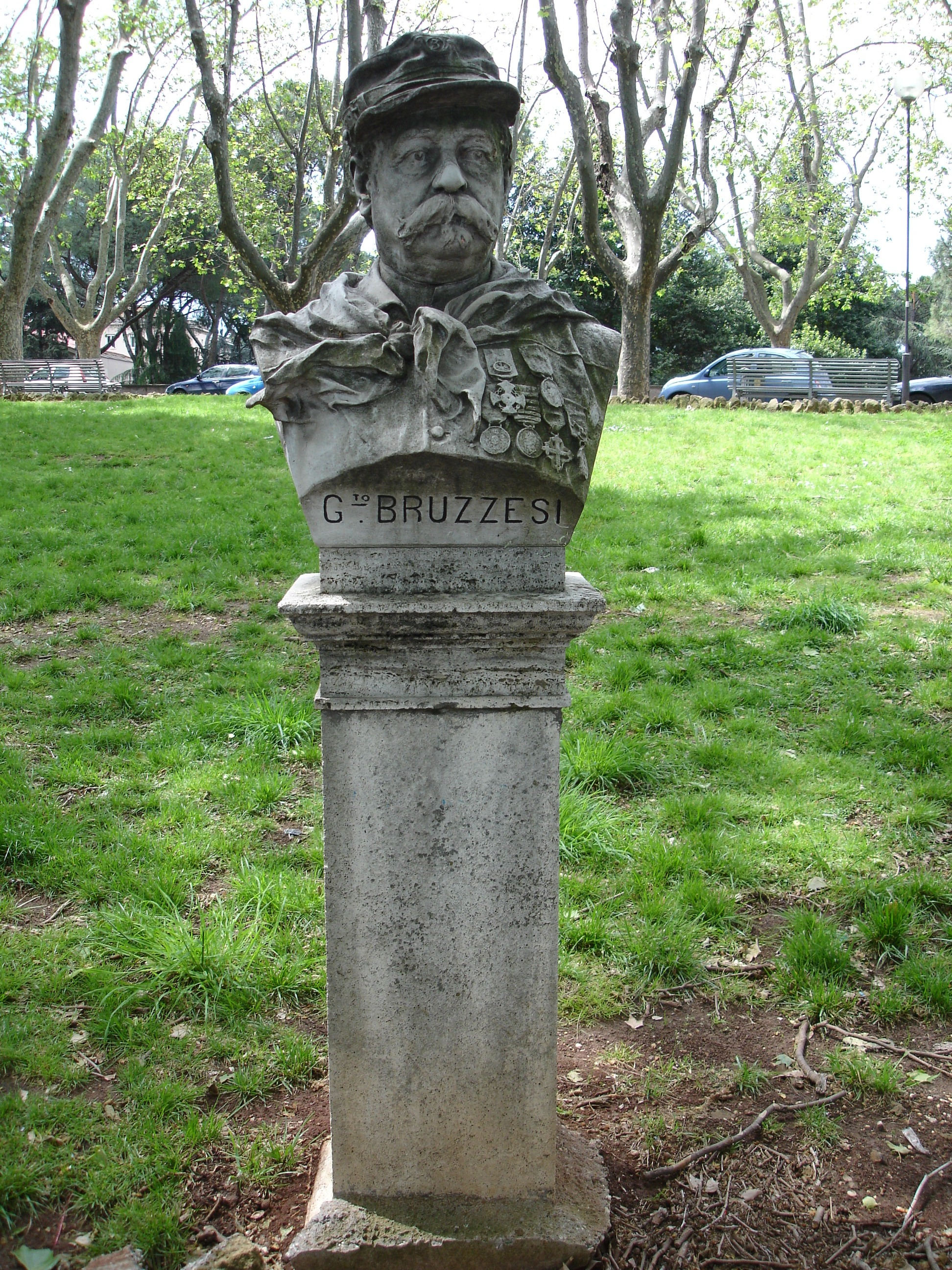 Busto di Giacinto Bruzzesi (Cerveteri, Rm 1822 - Turate, Co 1900), tenente della Repubblica Romana, medaglia d'oro. Foto fatta da me F. Fullone al Gianicolo. Original uploader was Fullo88 at it.wikipedia